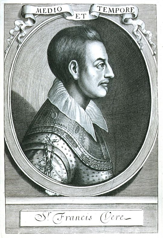 Retrato de Francis Vere (grabado). Portrait of Sir Francis Vere (engraving).